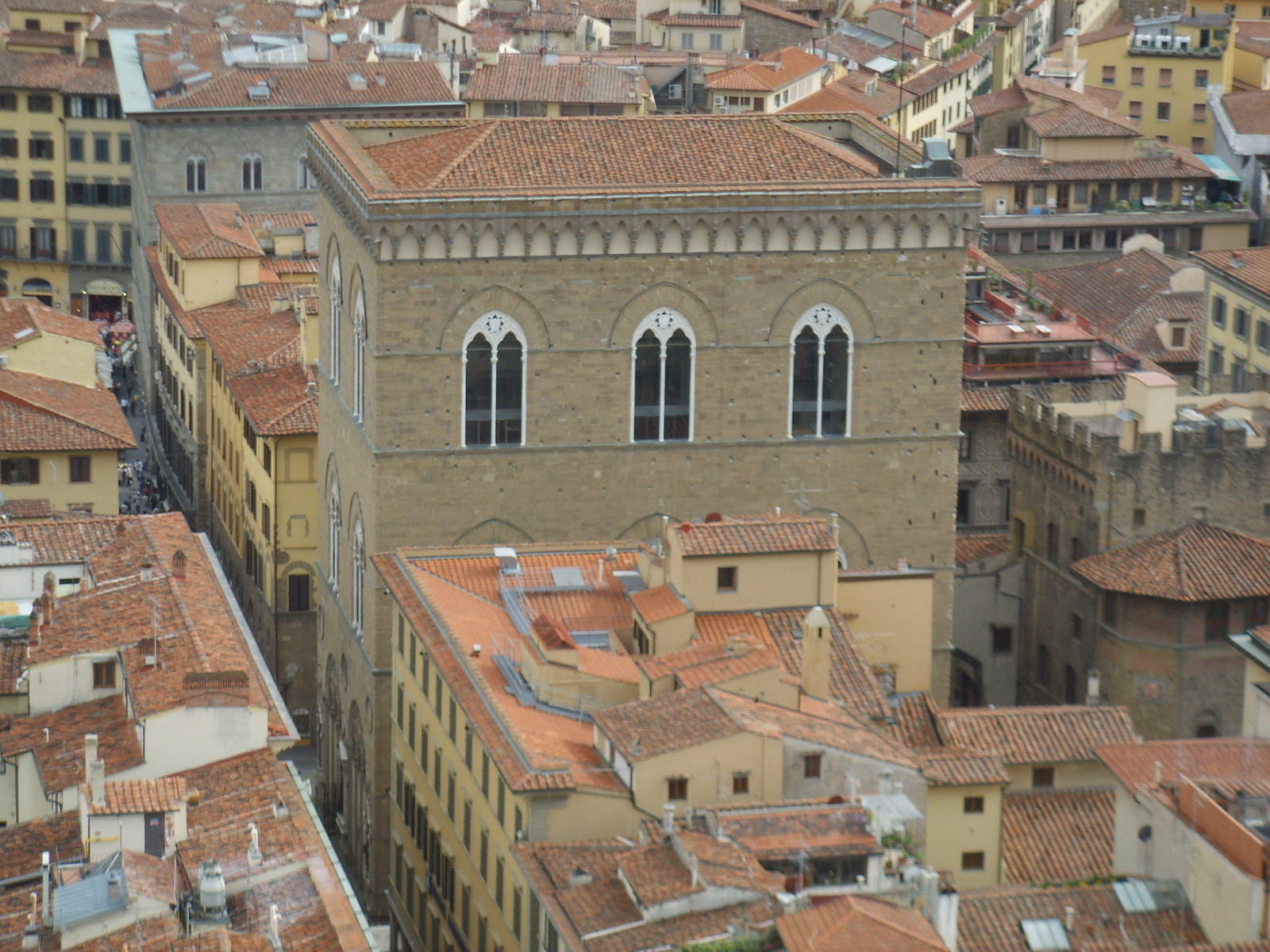 Firenze, Chiesa di Orsanmichele, Via dei Calzaiuole